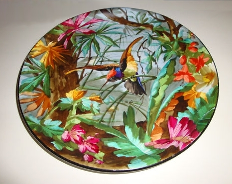 Plat aux oiseaux, Creil-Montereau, France